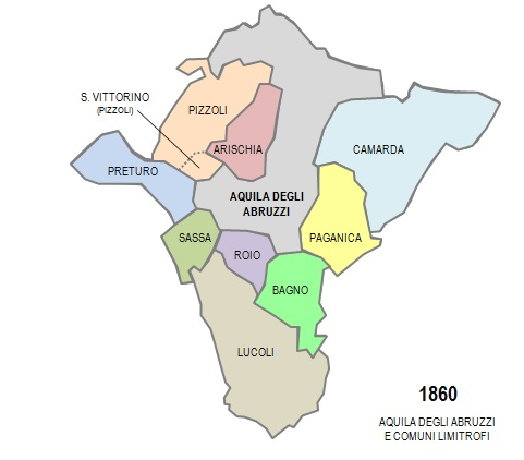 La suddivisione del "contado aquilano" dopo l'annessione al Regno d'Italia